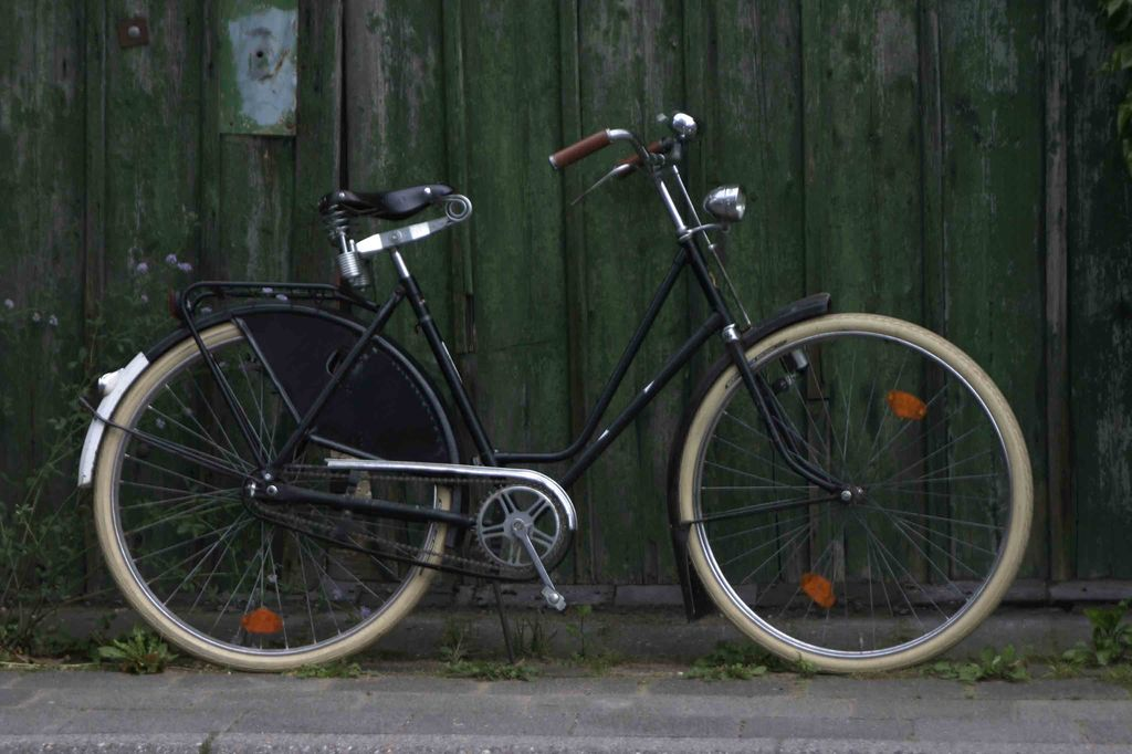 Fongers "Comfort" Damenrad von 1973. Der Gepäckträger wurde zu einem späteren Zeitpunkt nachgerürste. Der Lenker stammt von der Firma "Union" und ist ebenfalls nicht original.